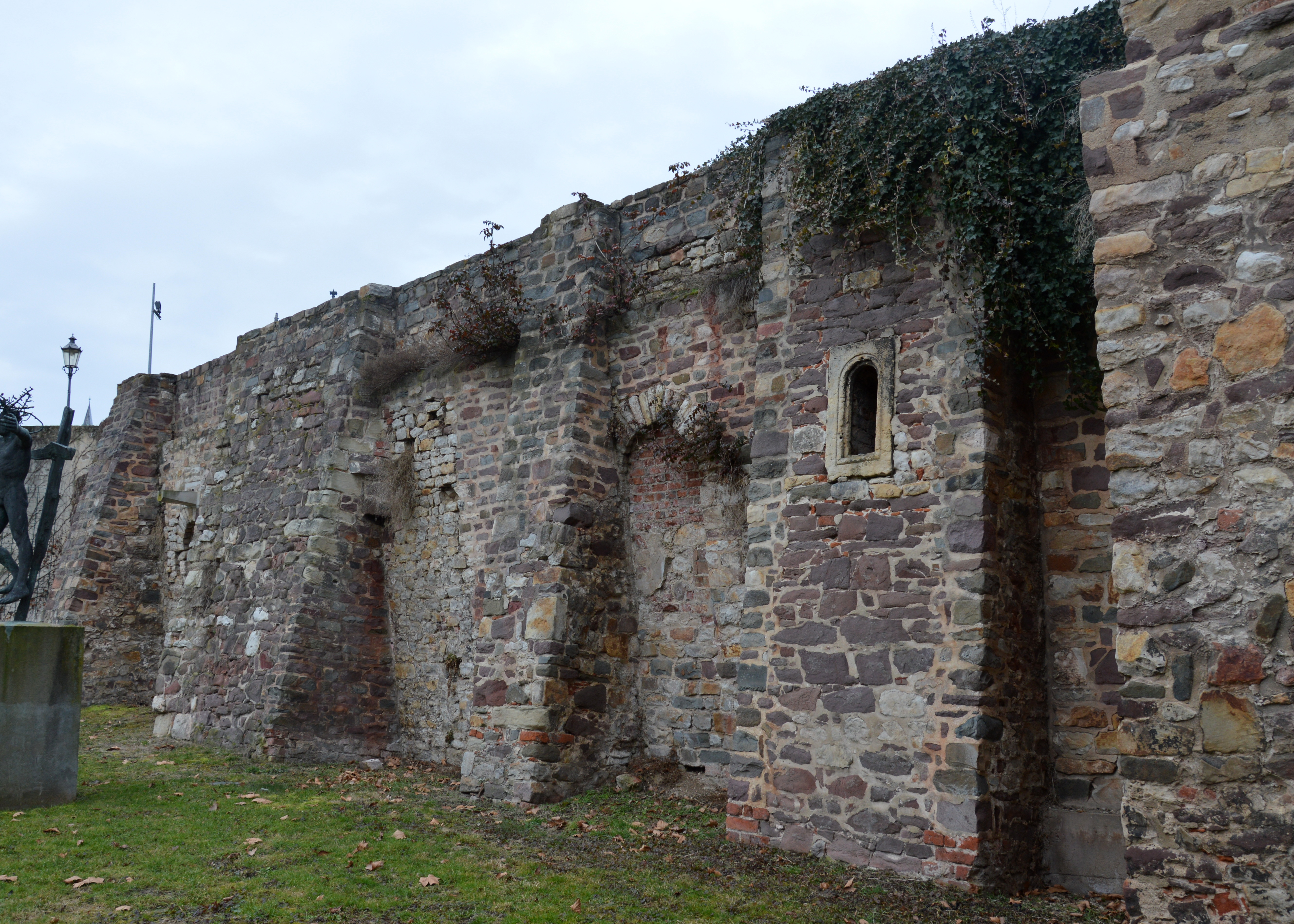 Stadtmauer Magdeburg am KULF